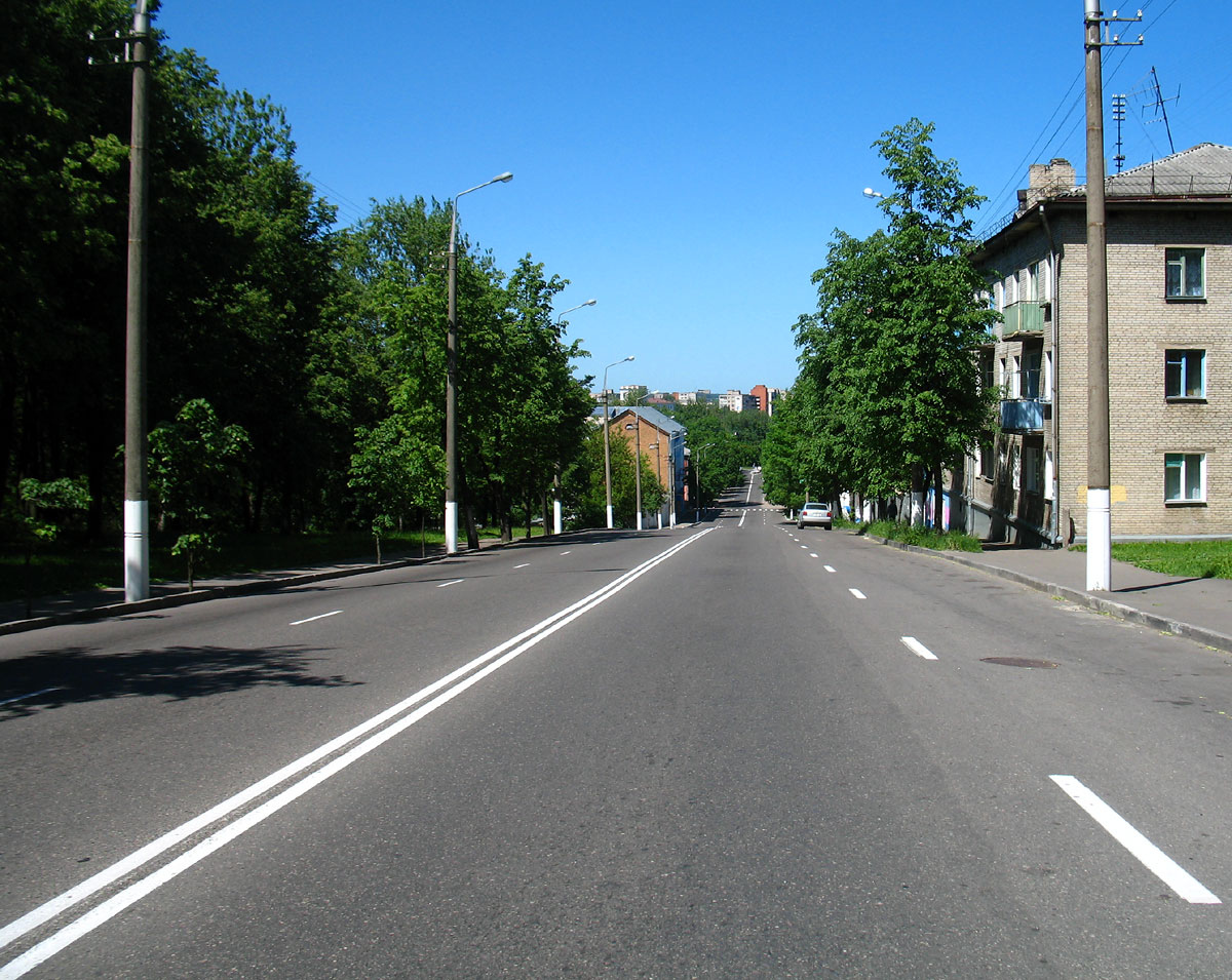 Zaručaŭskaja (Kalinina) street in Viciebsk